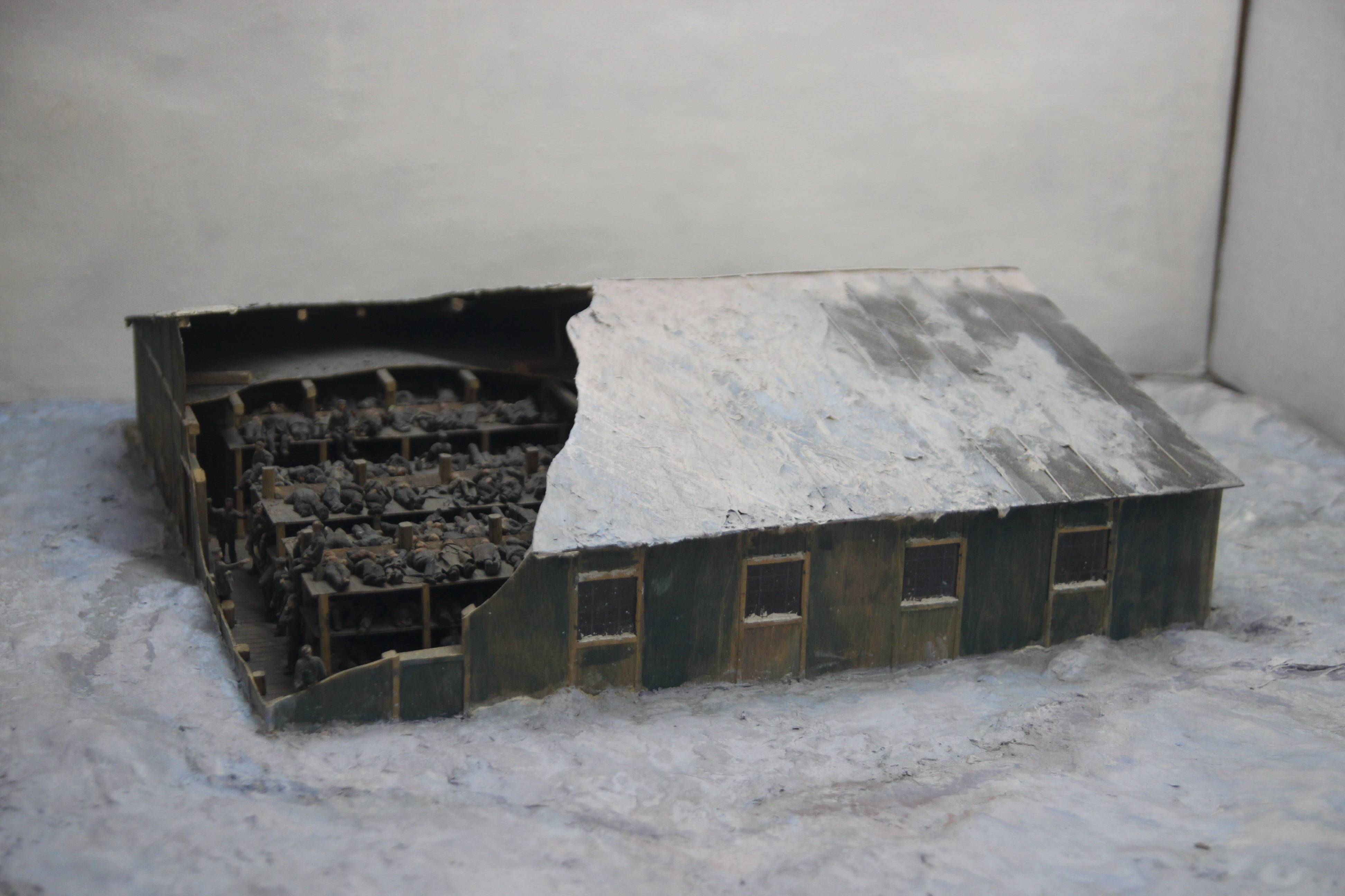 Макет Йоканьгской тюрьмы 2